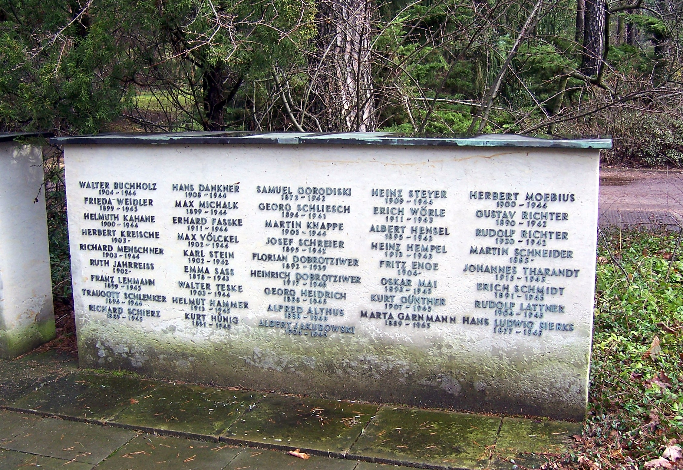 Symbolische Gräber, u.a. der ermordeten Antifaschisten Alfred Althus und Heinz Steyer, auf dem FIR (Fédération Internationale des Résistants)-Ehrenhain des Heidefriedhofs Dresden. Der Namensblock ist einer von dreien des Ehrenhains, der ausschließlich symbolische Gräber zeigt.